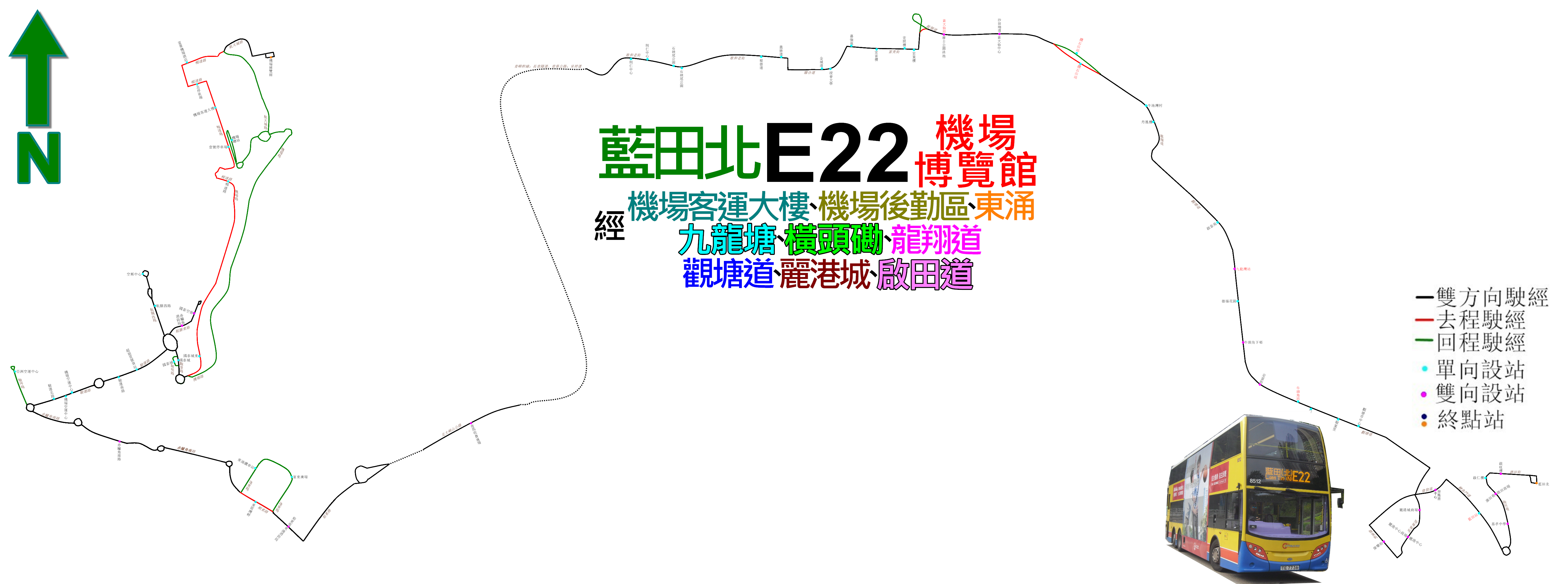 中文（香港）: 城巴E22線的走線圖